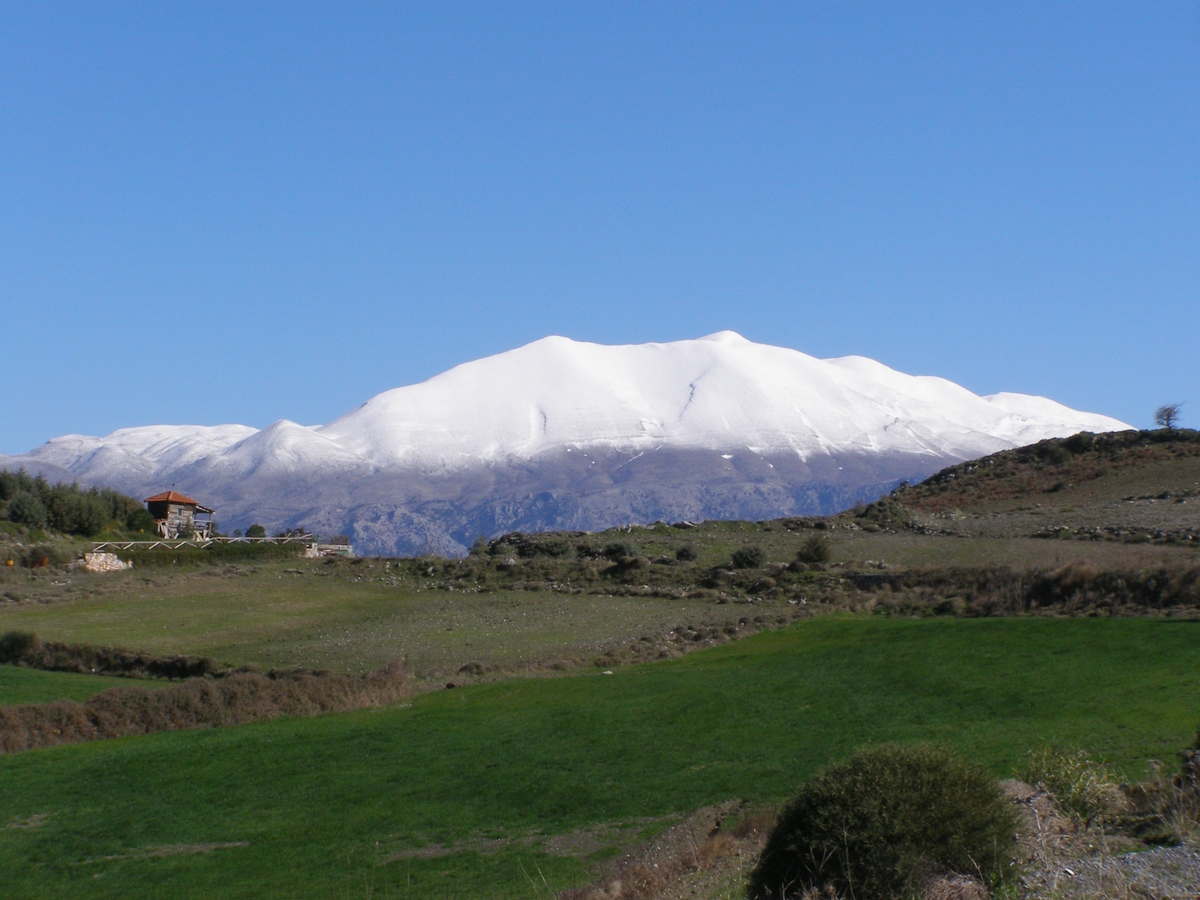 Der Psiloritis aus südlicher Richtung gesehen